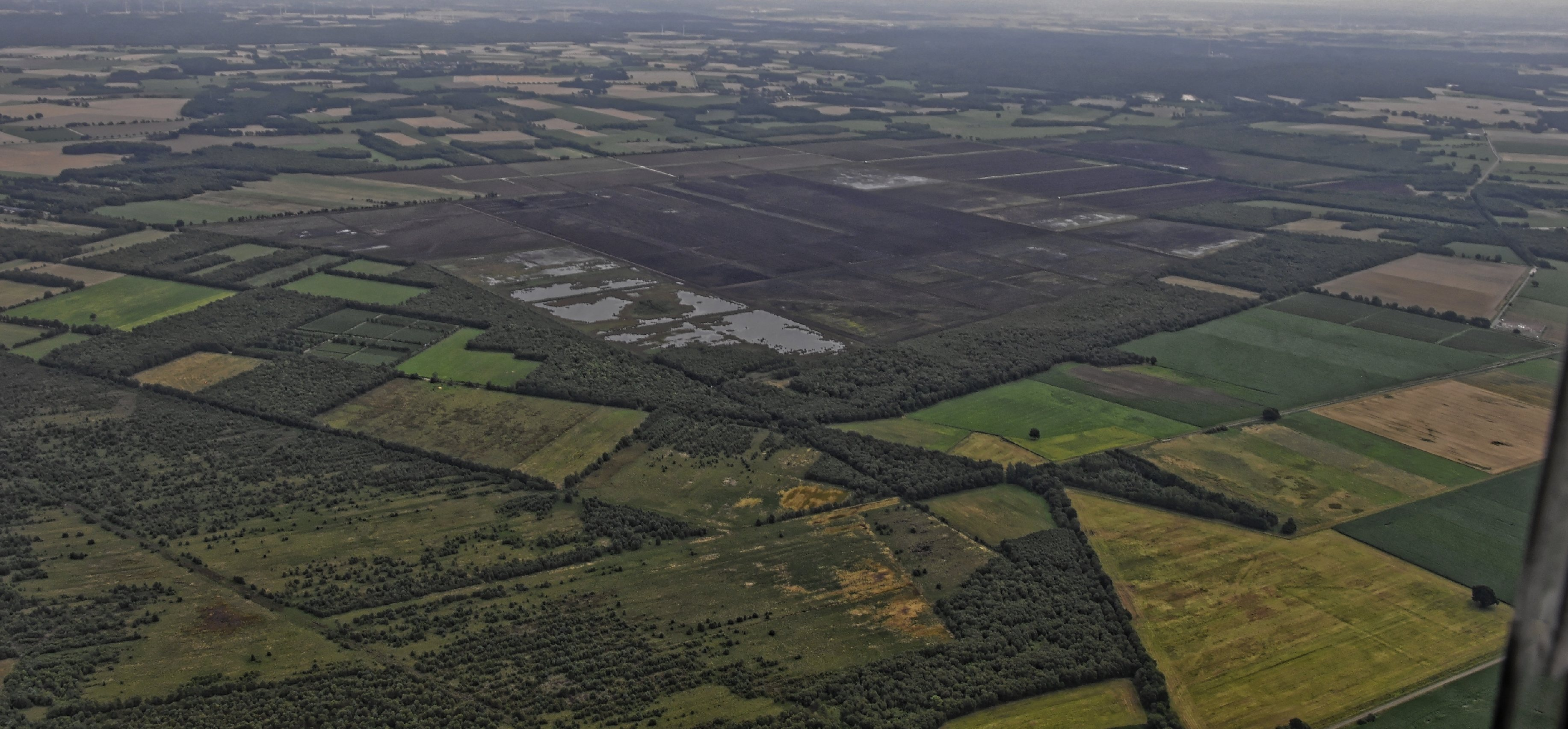 Bilder vom Flug Nordholz-Hammelburg 2015: Blick von Westen auf das Borsteler Moor (vorn links) und das südlich angrenzende Torfabbaugebiet.